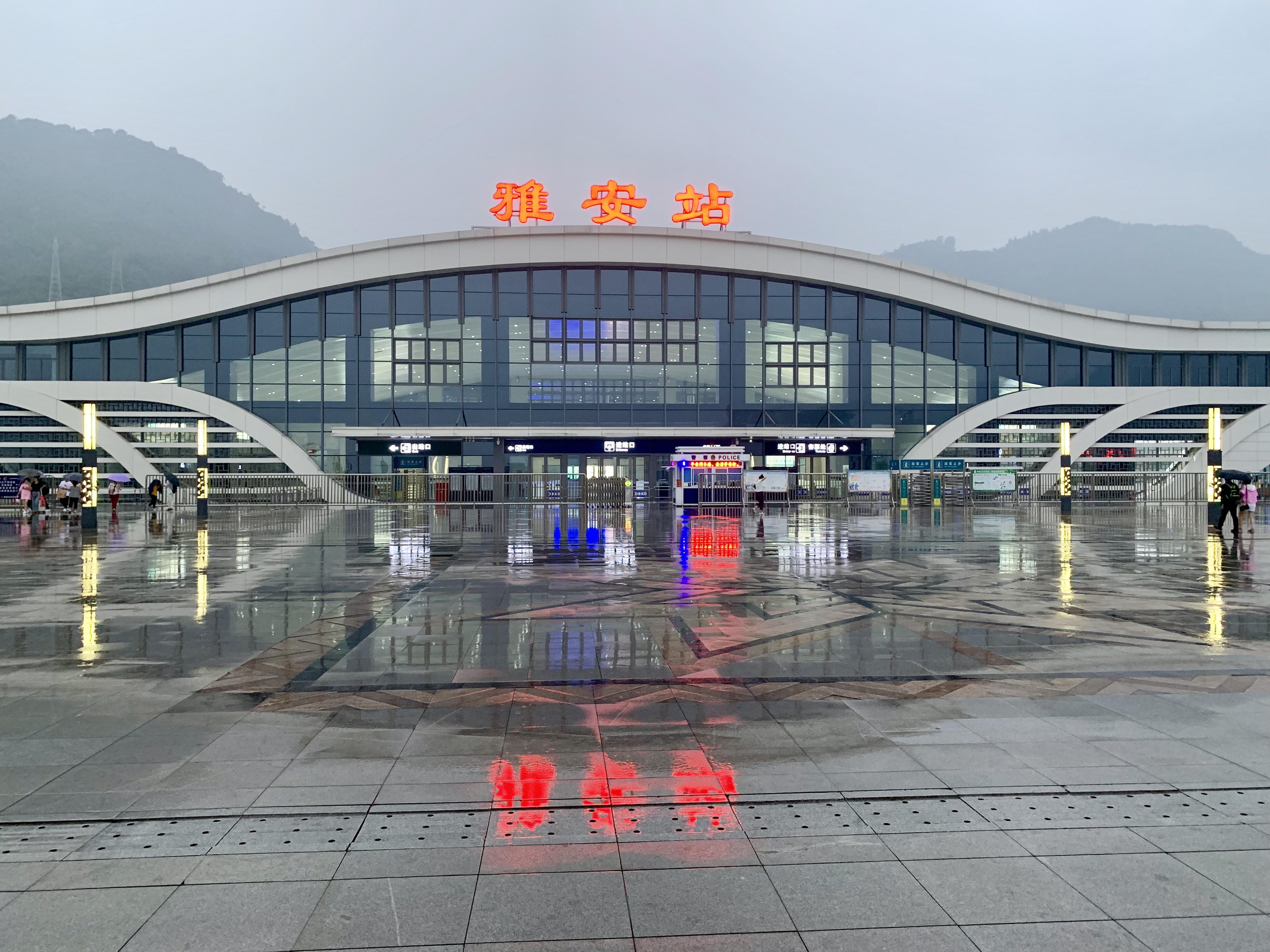 雅安站正面外貌